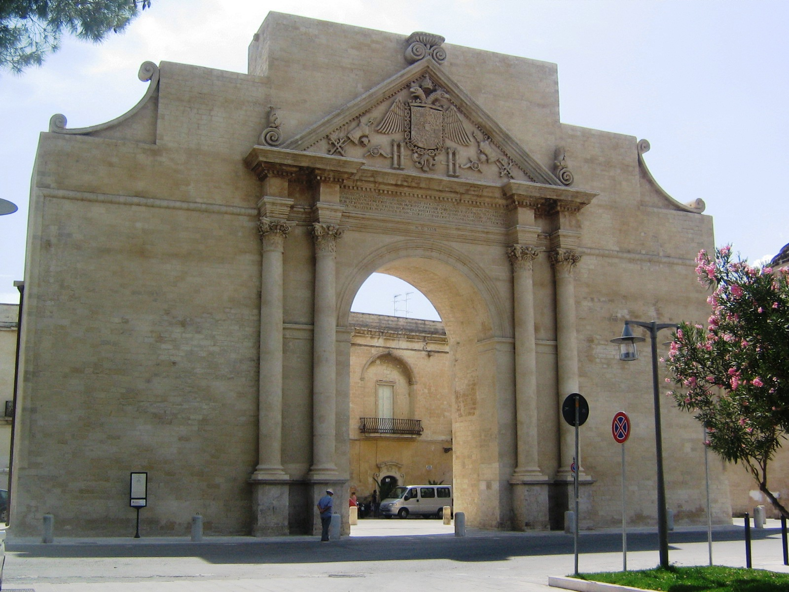 Lecce, Porta Napoli; architect: Gian Giacomo dell'Acaya